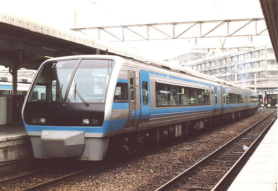 JR四国 2000系気動車TSE 2001 「しまんと51号」